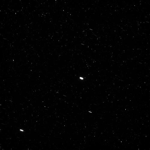 Saturni kuu Hati pildistatuna Cassinilt